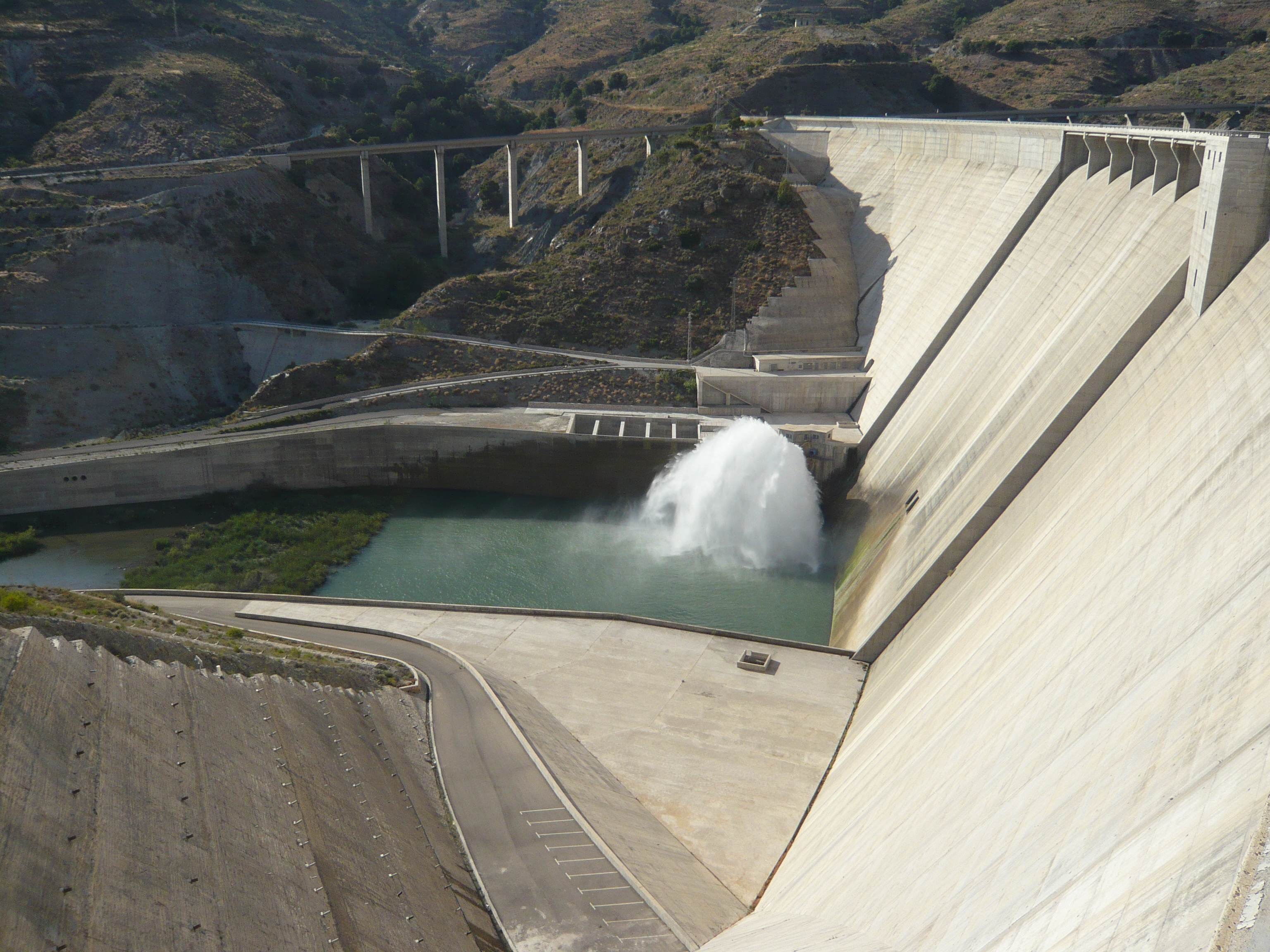 Puente en Vélez de Benaudalla